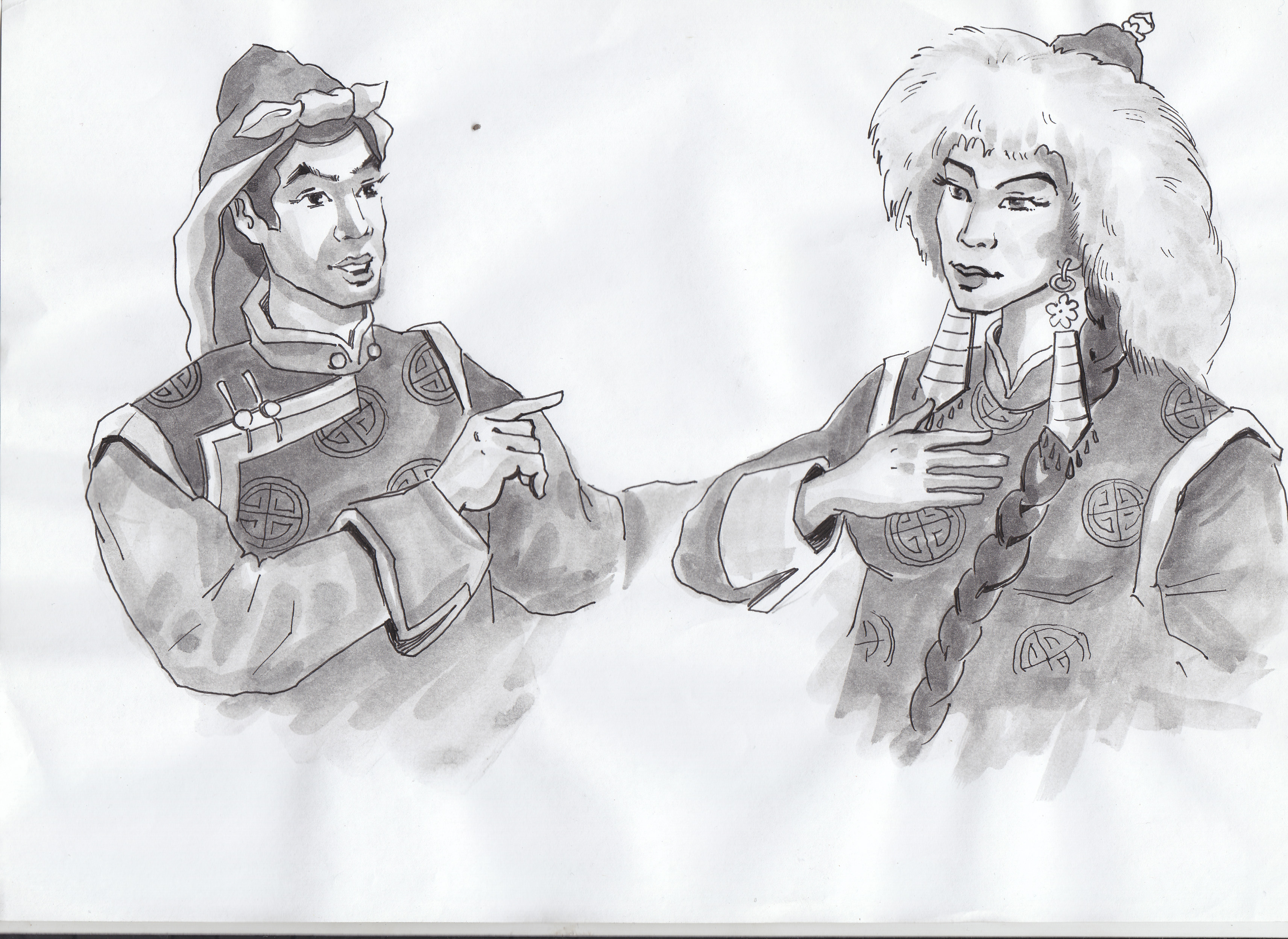 Тыва дыл: "Тывалап чугаалажыылыңар" деп номдан чурук